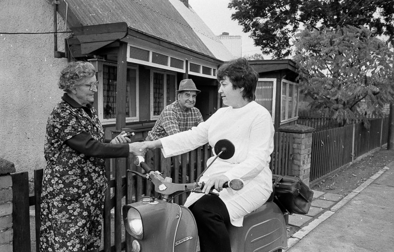 ADN-ZB/Pätzold/1.11.82 Bez. Schwerin: Wenn Gemeindeschwester Karin Arp mit ihrer "Schwalbe" vorbeikommt, bringt sie meistens gleich Medizin für ihre Patienten mit. So wie die Familie Böhm in Carlow, Kreis Gadebusch, betreut die Schwester viele Bürger in Carlow und weiteren acht Ortsteilen.